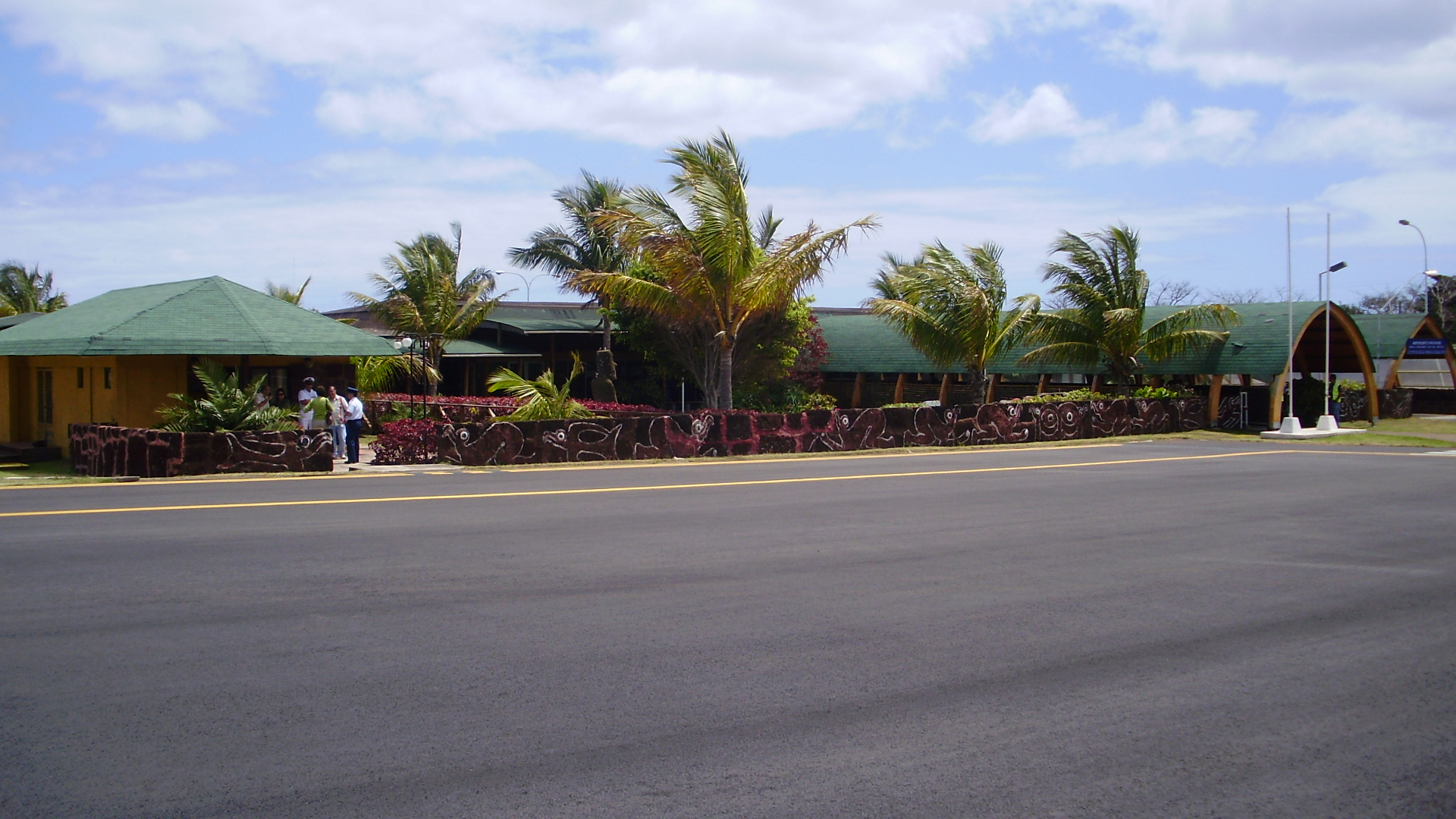 Aeropuerto Mataveri, en Isla de Pascua, Chile.